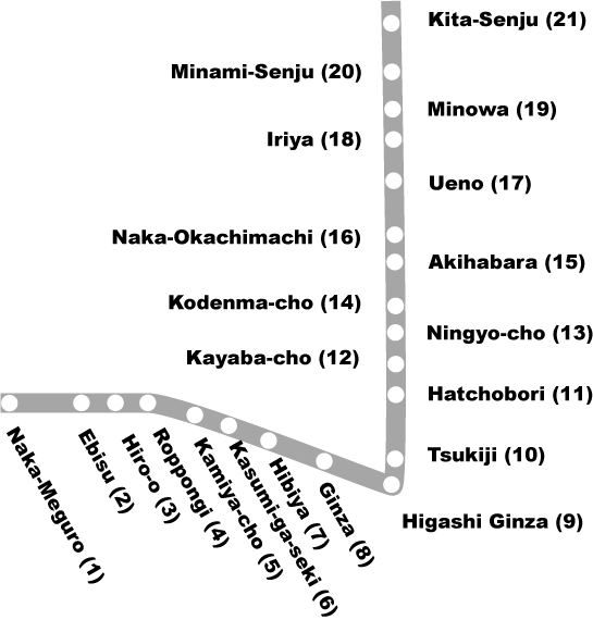 Tokyo Metro Tokyo Metro Hibiya Line